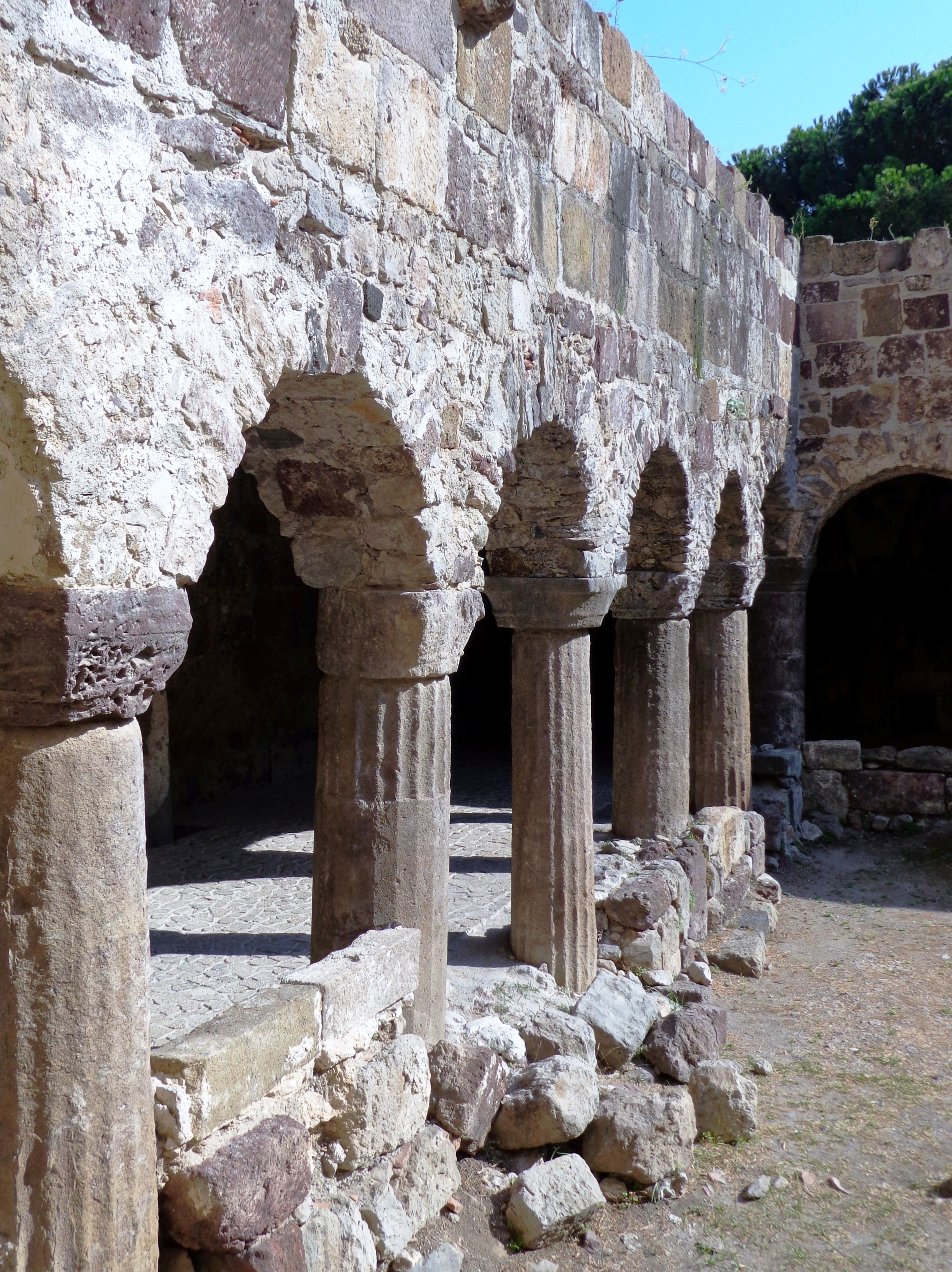 Il Monastero